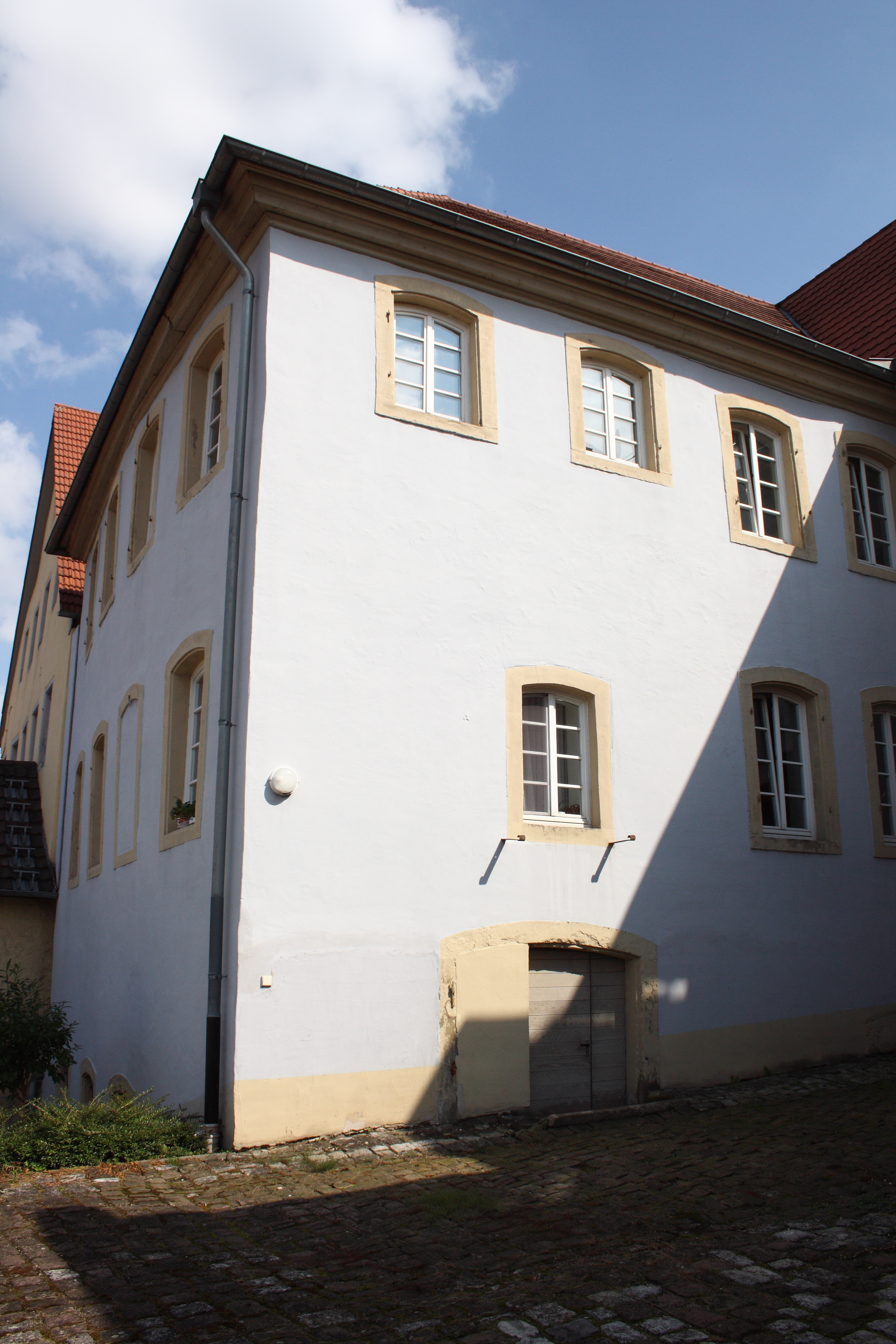 ehemalige Synagoge in Gochsheim, Hauptstraße 70